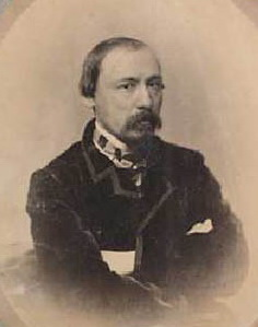 Некрасов Н. А. (фото Тулинова, 1861) из коллекции Государственного литературно-мемориального музея-заповедника "Карабиха"